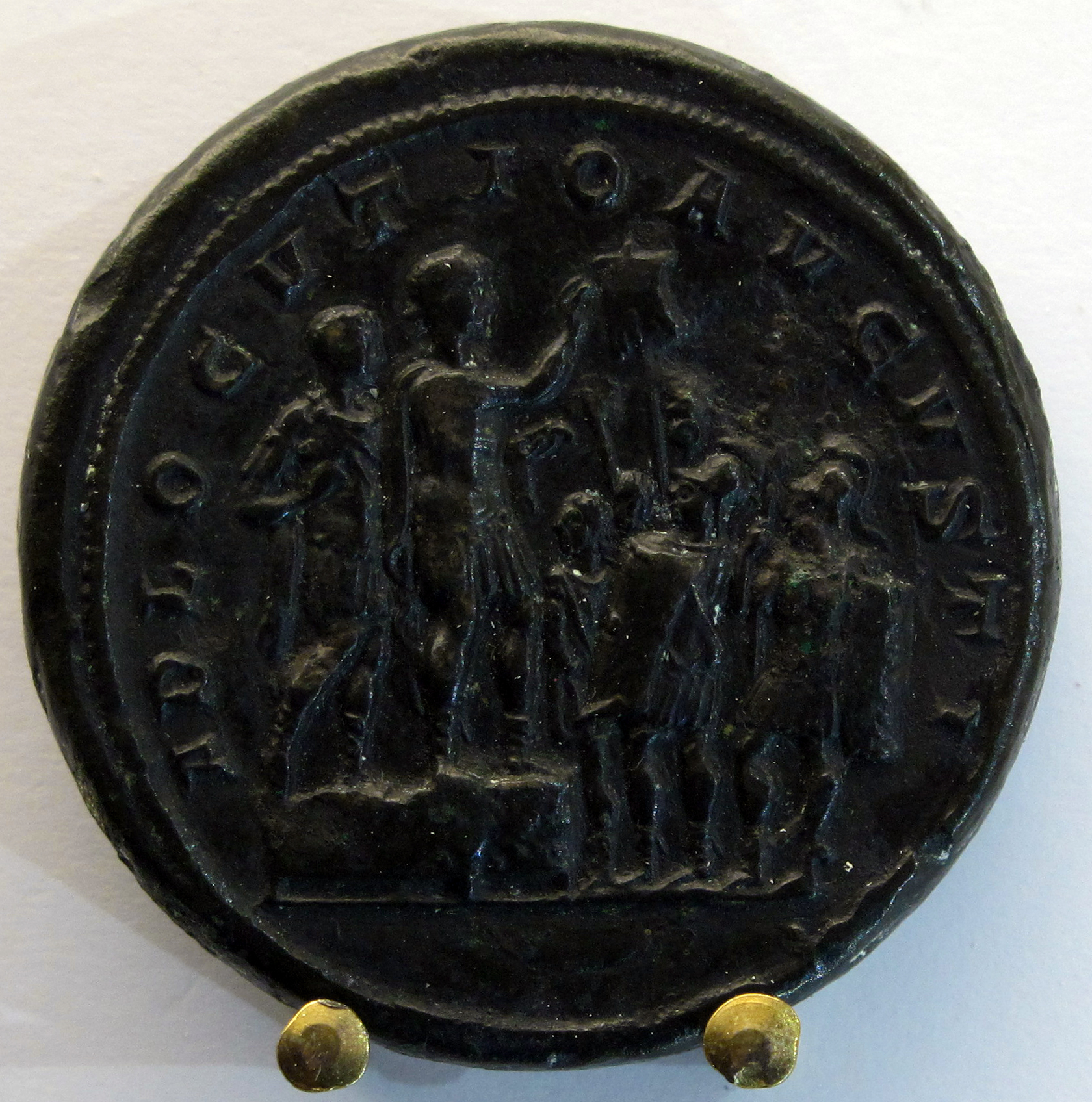 Medaglione di gordiano III, con adlocutio